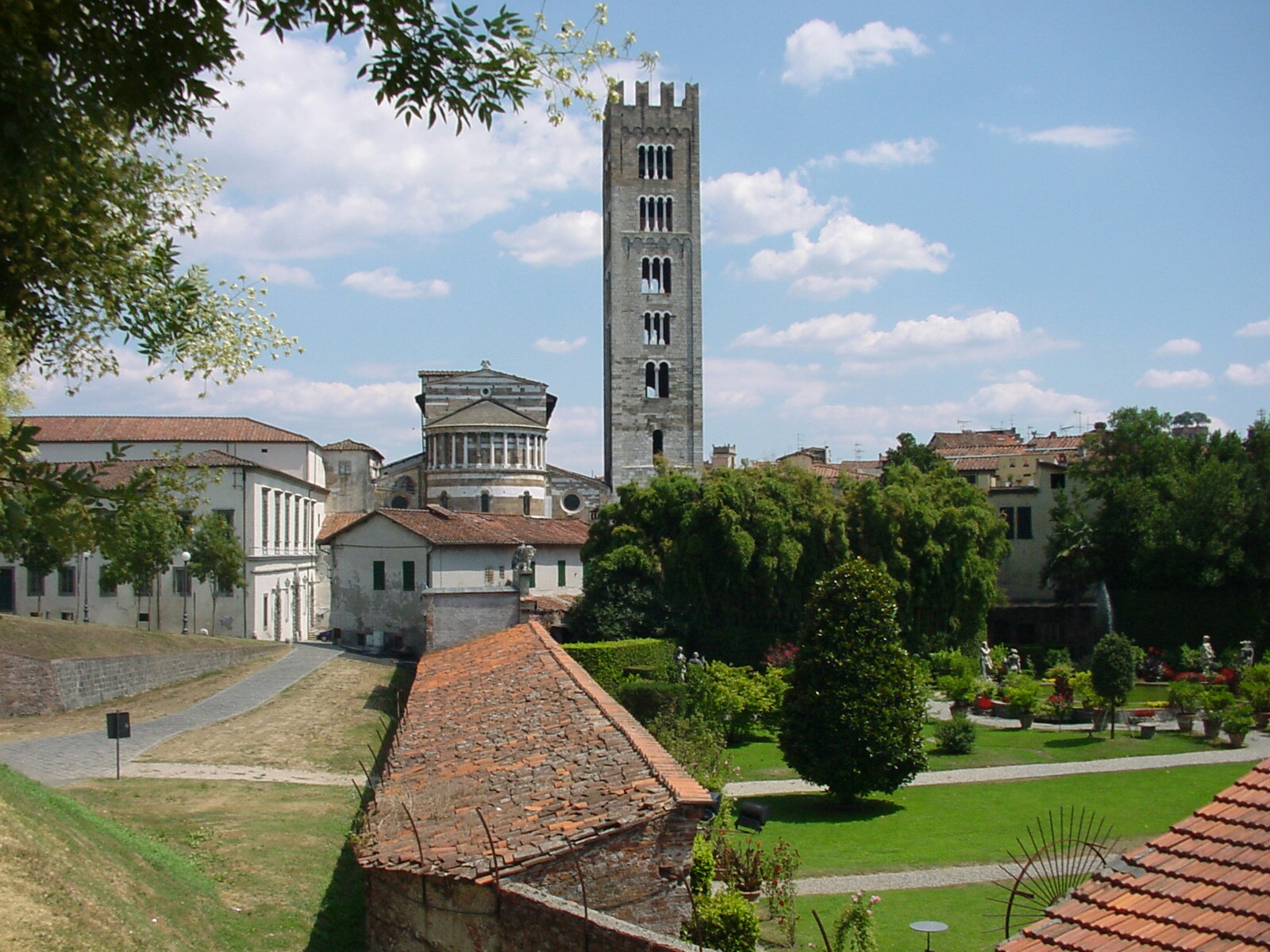 Lucca Ansicht